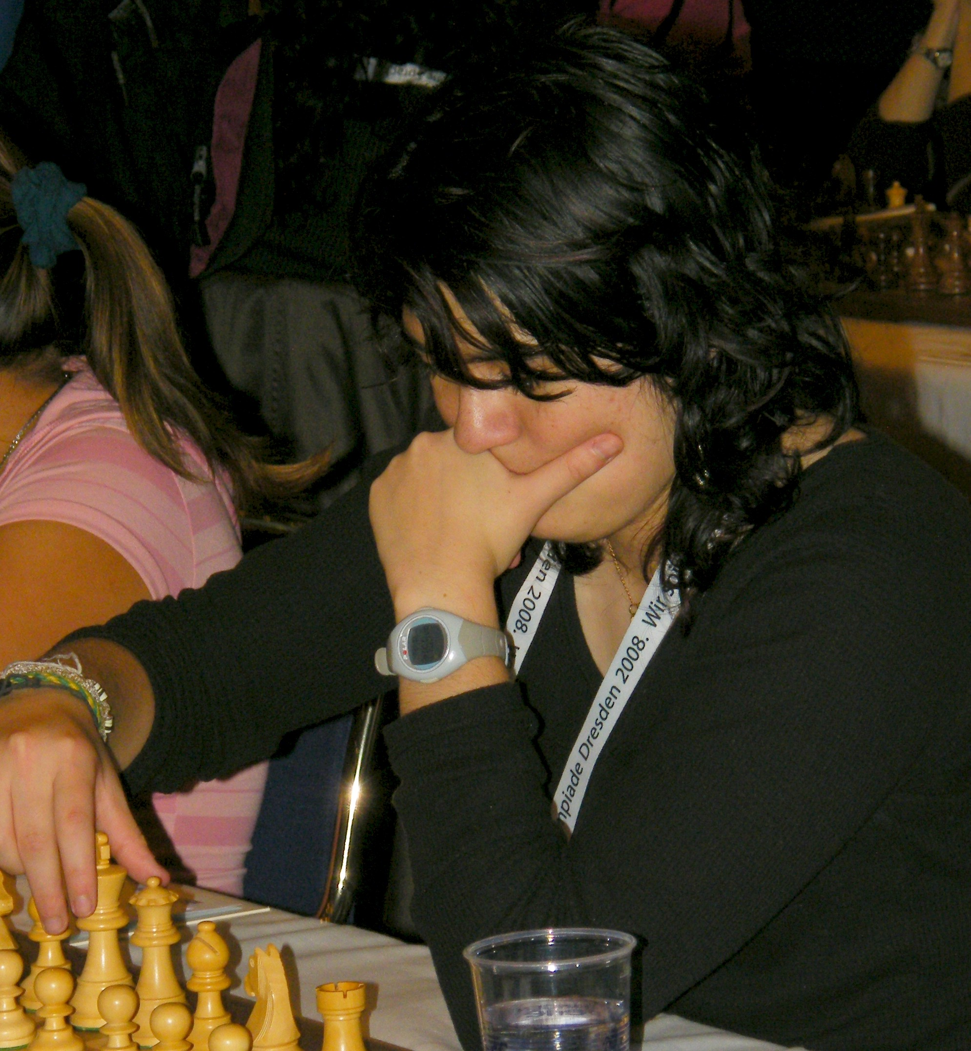 Carla Heredia Serrano bei der 38. Schacholympiade in Dresden 2008